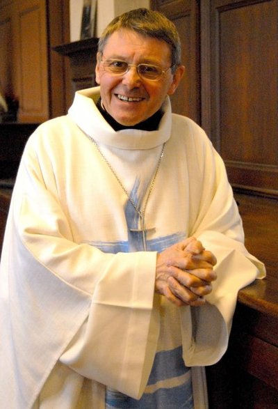 Mgr Gilbert Louis, évêque émérite de Châlons